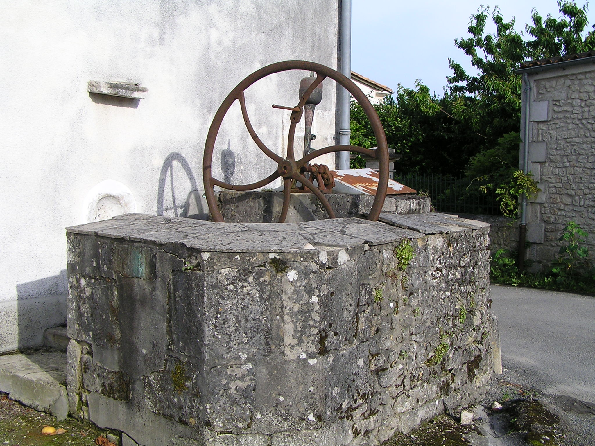 puiots à Touzac